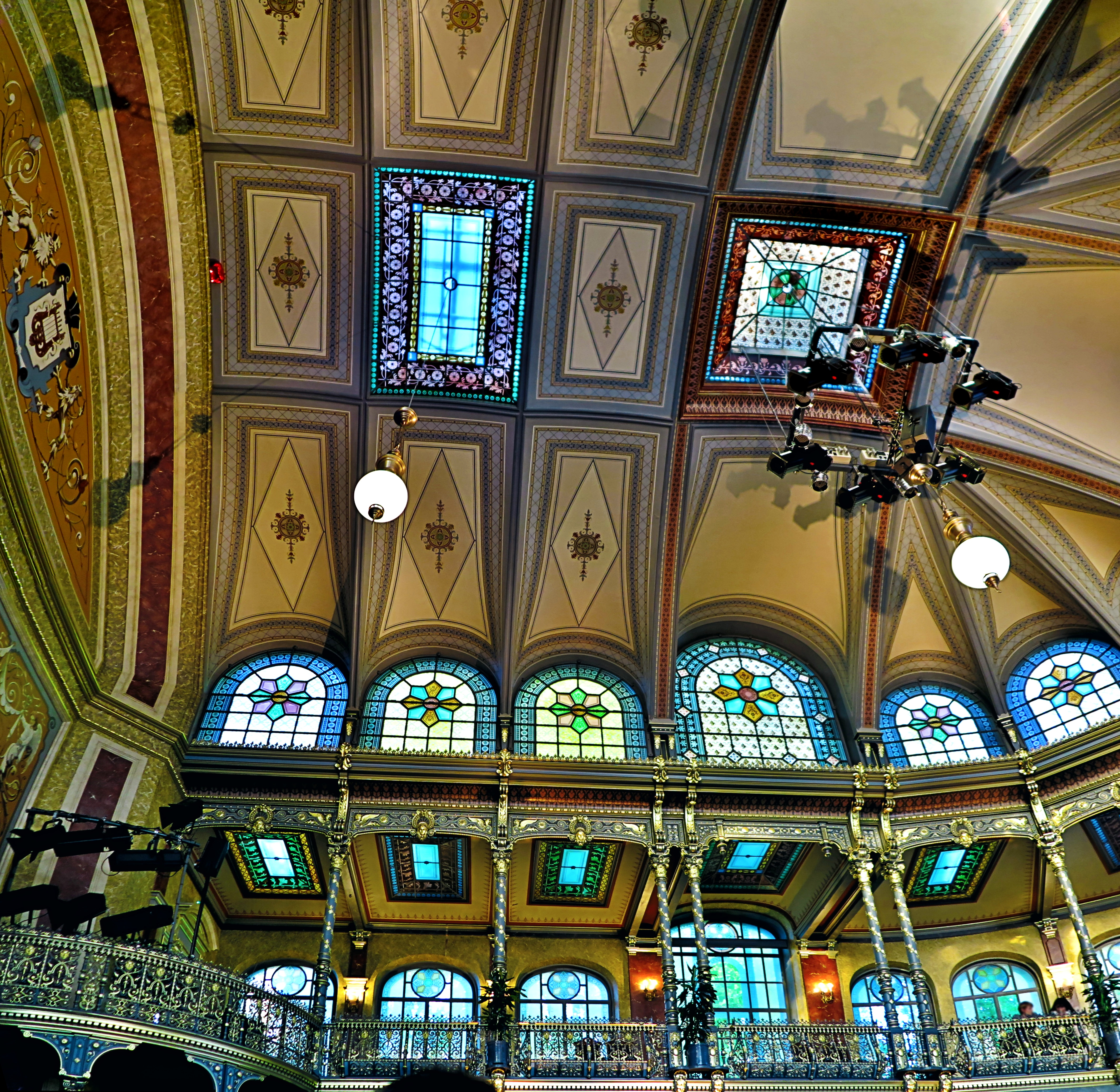 Deutschland, Bayern, Schwaben, Augsburg, Parktheater Göggingen, Blick auf die Glasfensterfassade im Seitenteil und in der Dachkonstruktion